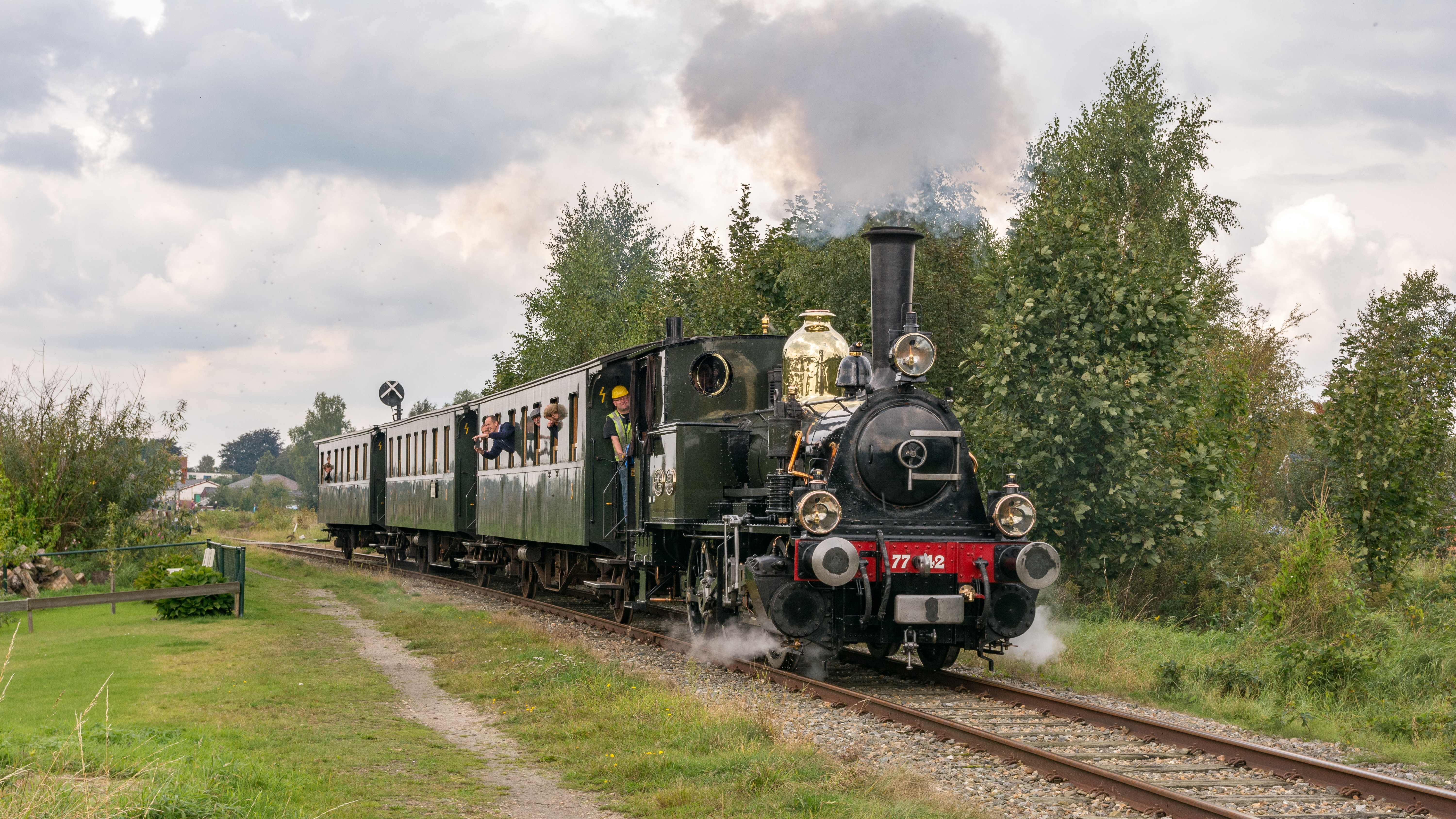 Helaas kan ik komend weekend ivm verplichtingen niet naar de M.B.S. Het evenement is een week vroeger dan gebruikelijk. Bello die ook daar zal zijn, zag ik een maand geleden al in Stadskanaal. Loc 7742 (Bello) reed hier trein 3758 naar Musselkanaal, net in de bocht na het station. Toch wens ik iedereen veel plezier in Haaksbergen. Foto: 17-09-2017